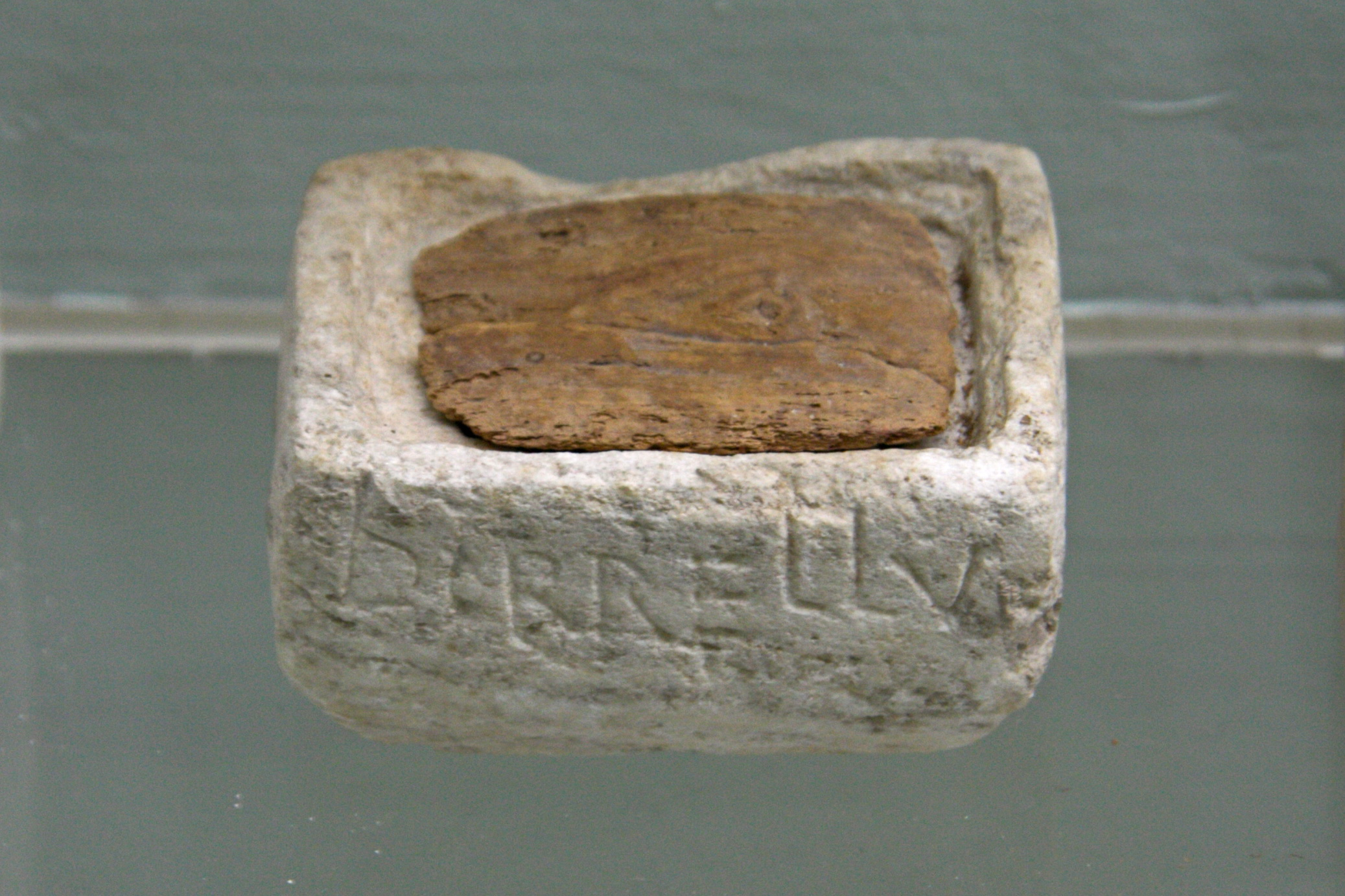 Lipsanoteca de Bestracà provinent del Monestir de Sant Pere de Rodes que actualment es conserva al Museu d'Art de Girona.